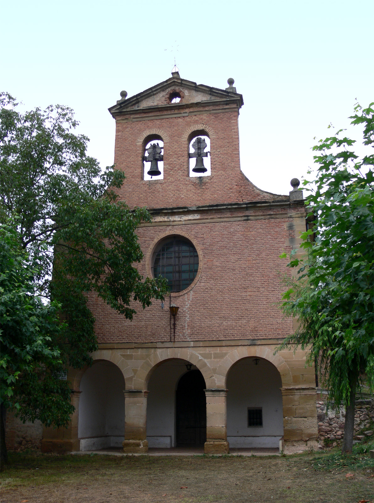 Ermita de Nuestra Señora del Patrocinio en Pedroso (La Rioja - España)